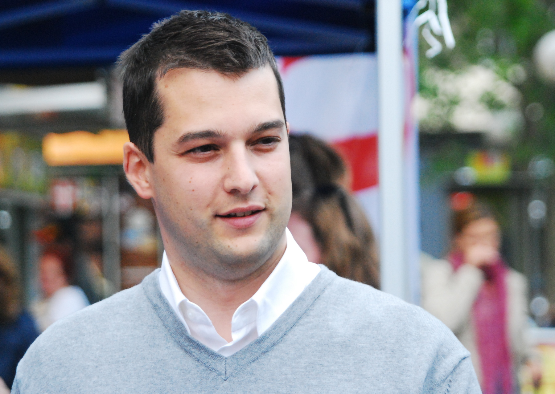 Dominik Nepp am 22. Mai 2012 bei Fototermin der FPÖ-Wien vor dem Bahnhof Heiligenstadt in Wien-Döbling.